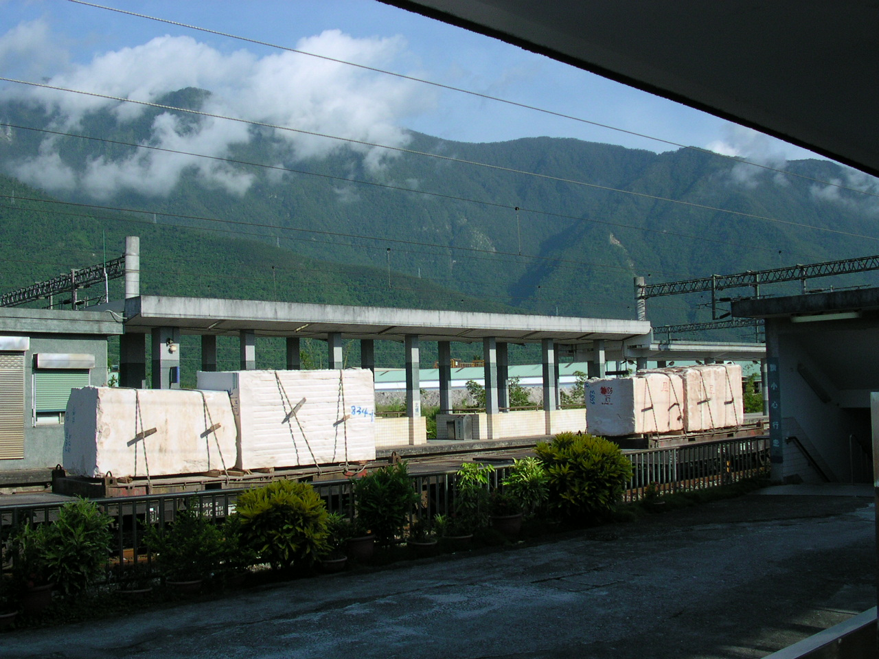 臺鐵北迴線北埔車站月臺。